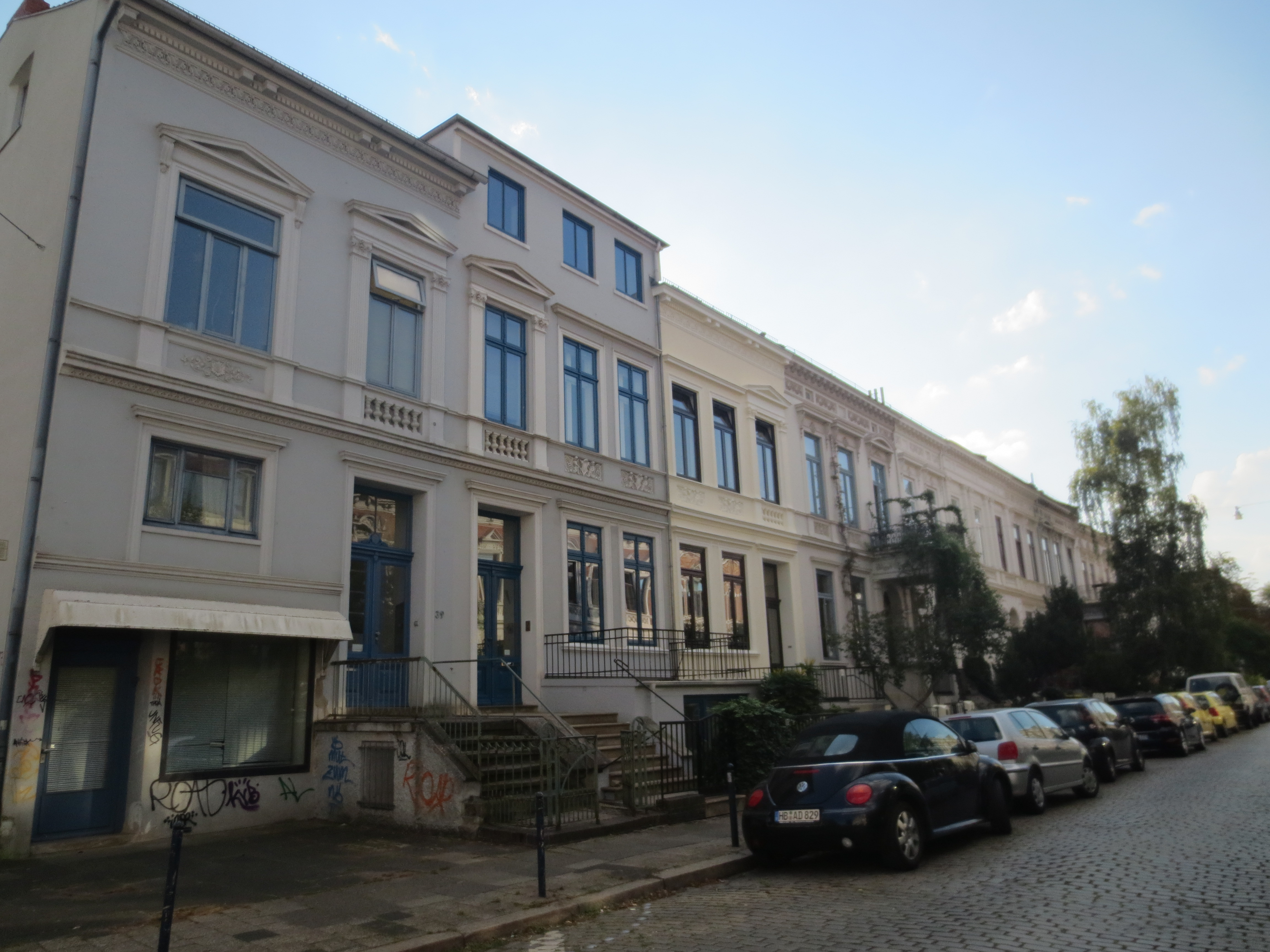 Wohnhausgruppe in Bremen, Feldstraße 23Die Denkmalgruppe ist ein geschütztes Kulturdenkmal in der Freien Hansestadt Bremen, mit der Nr. 1217 beim Landesamt für Denkmalpflege registriert.